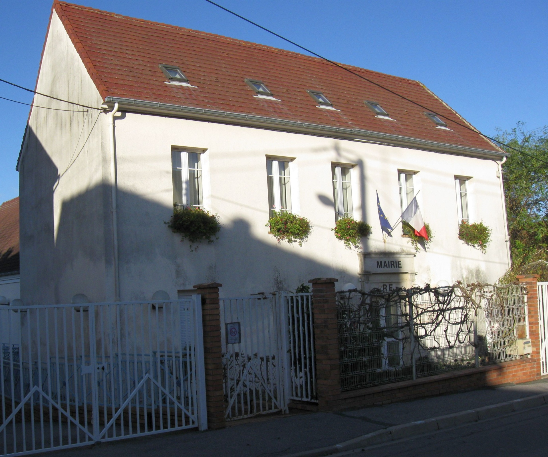 Mairie de Fublaines. (Seine-et-Marne, région Île-de-France).